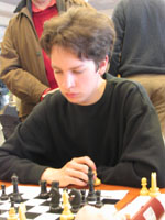 Daniël Stellwagen.